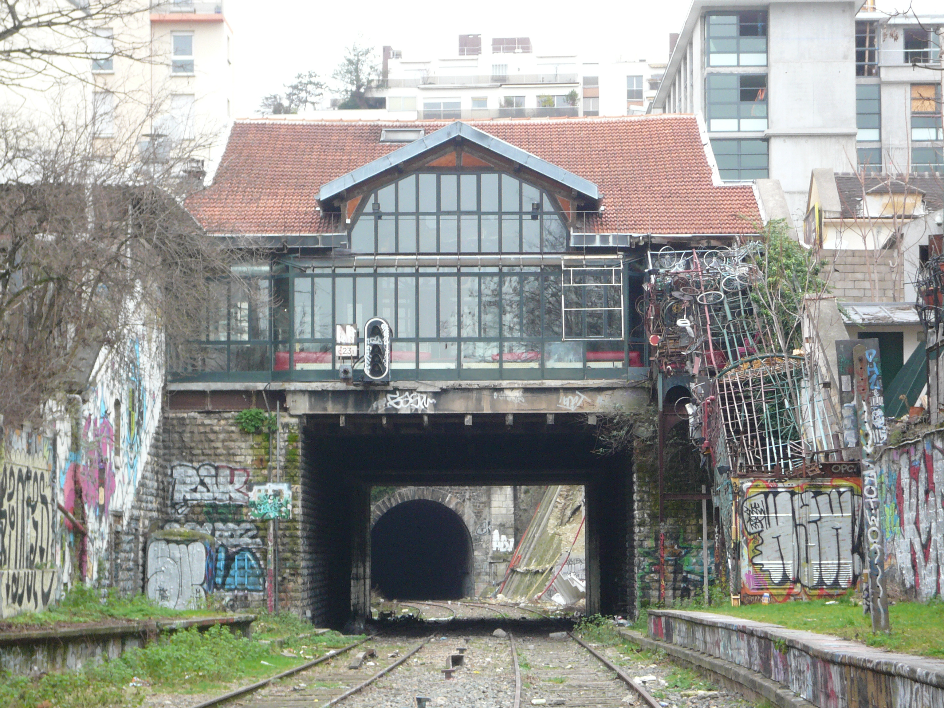 Paris, France - La gare de Charonne, convertie en café "La Flèche d'Or", au fond arche du tunnel de Charonne.